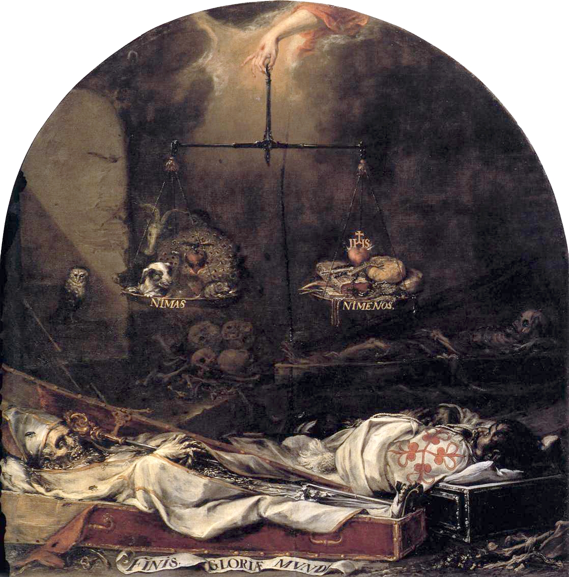 Esta obra, junto con la que lleva por título In ictu oculi, le fue encargada a Juan de Valdés Leal para ser colocada en el sotocoro del Hospital de la Caridad de Sevilla, y al igual que en las pinturas del género Vanitas, aluden a la banalidad de la vida terrena y a la universalidad de la muerte, aunque también quedan unidas con el fin primordial de la Hermandad de la Caridad de Sevilla, que era el de enterrar a los ajusticiados e indigentes de la ciudad, al igual que otras hermandades similares existentes en España en esa época.